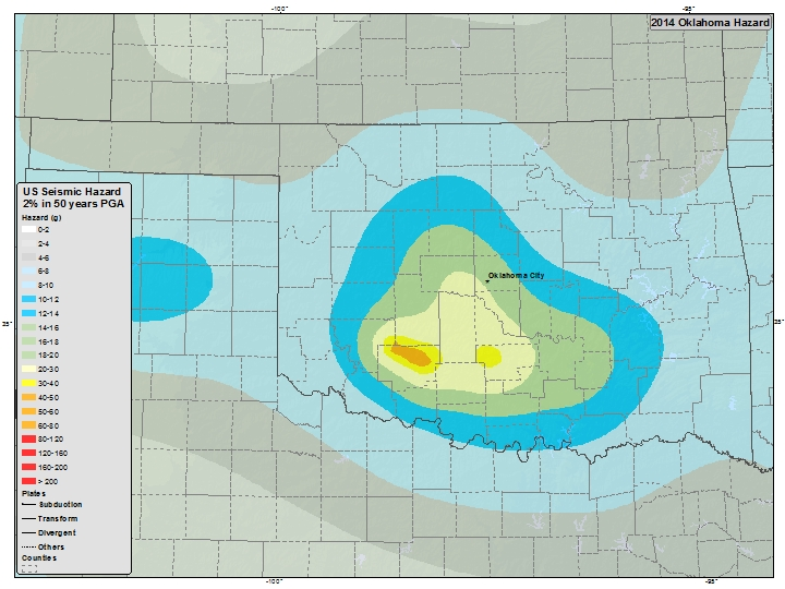 2014 Seismic Hazard Map